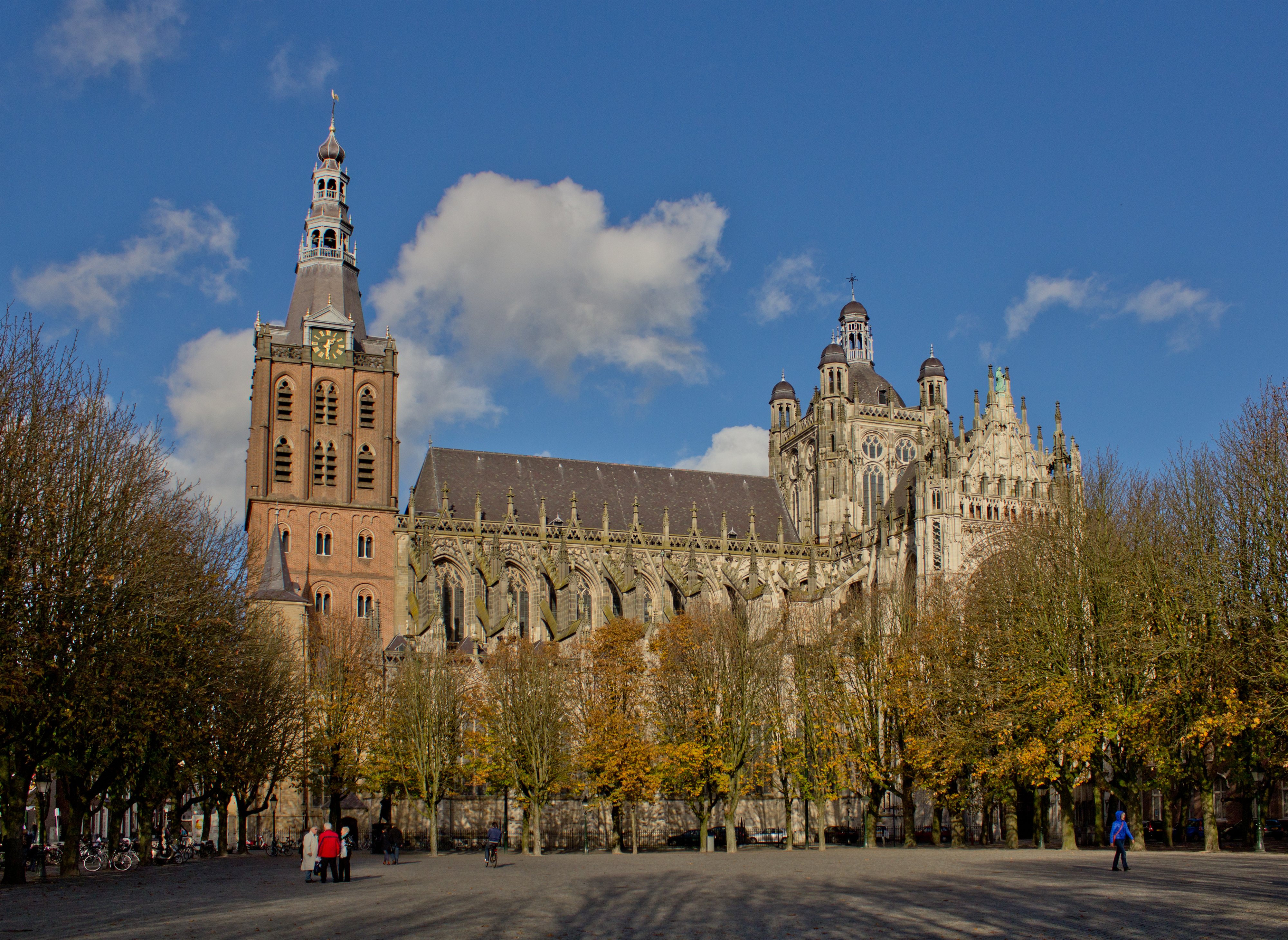 Den Bosch, Sint Janskathedraal